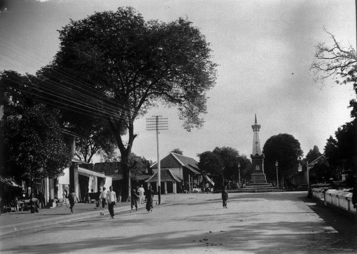 Foto. De Toegoe of Witte Paal in Jogjakarta. De paal is in 1867 geplaatst in plaats van de 22 meter hoge zuil, markerend oorspronkelijk het noordelijke einde van de vorstelijke processieweg vanaf de kraton, die door een aardbeving werd vernield.